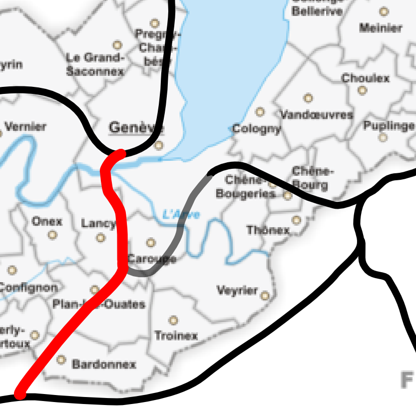 Tracé du CEVA à Genève, Suisse : 1933, alternative par la plaine de l'Aire vers Saint-Julien